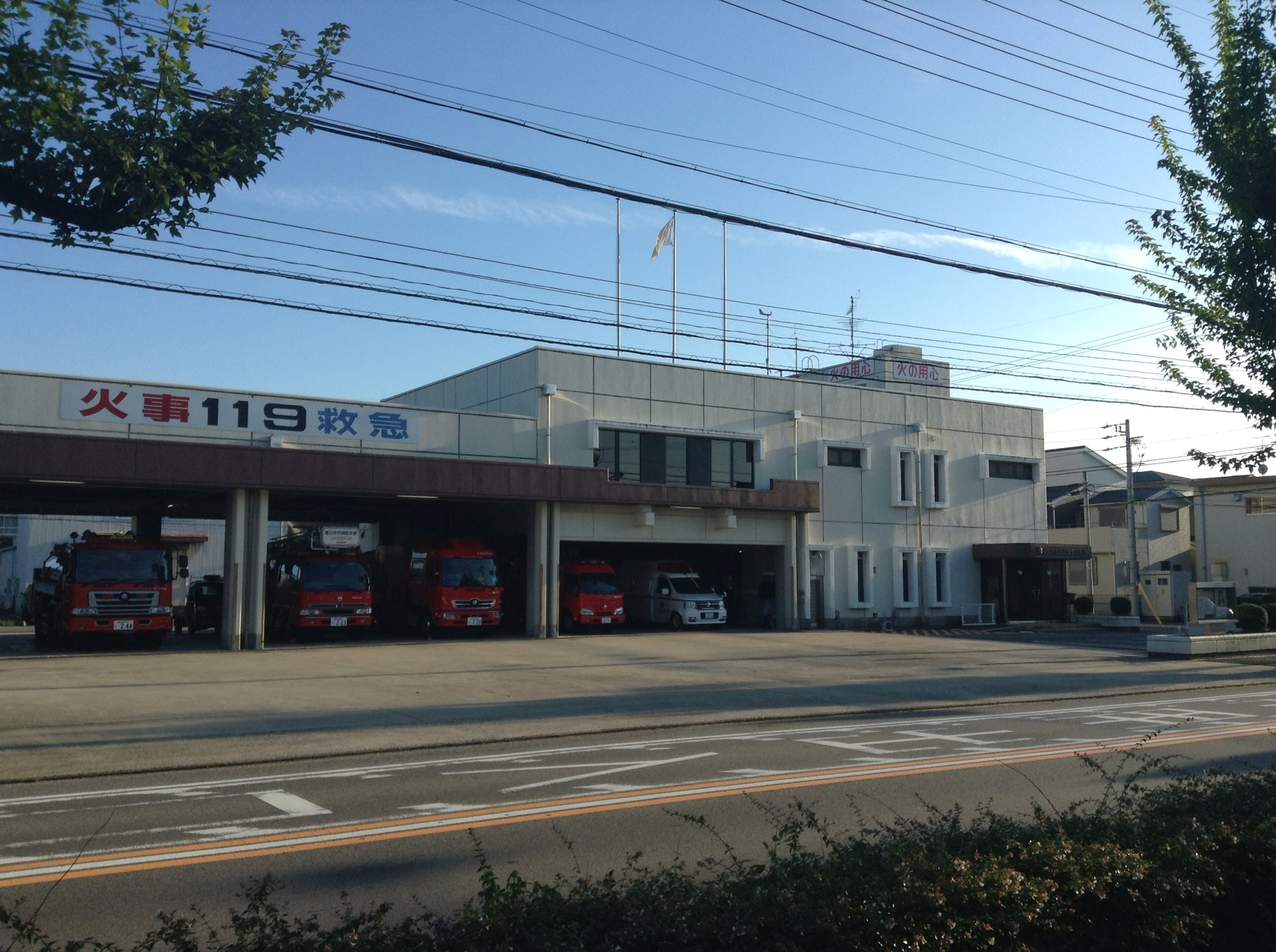 春日井市消防本部南出張所